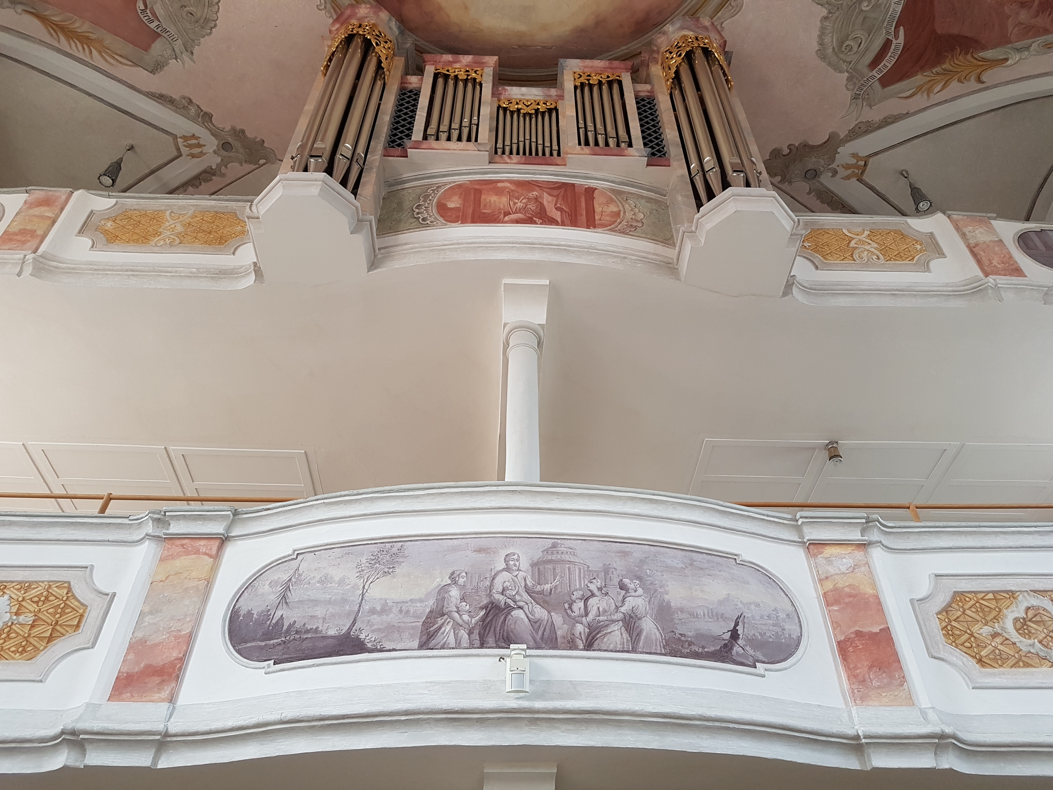 Burggen, Pfarrkirche St. Stephan